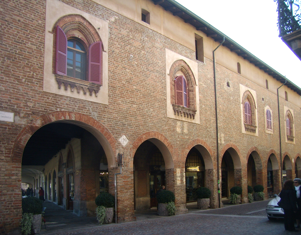 Palazzo Vistarini a Lodi, facciata su corso Vittorio Emanuele II